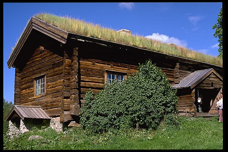 Uppförd av Nils Svensson vid 1600-talets slut. Parstuga (numera museum). Motiv: Kullängsstugan Nyckelord: Byggnadsminnen, Riksintressen Kategori: Museum, Torp Uppförd av Nils Svensson vid 1600-talets slut. Parstuga (numera museum).